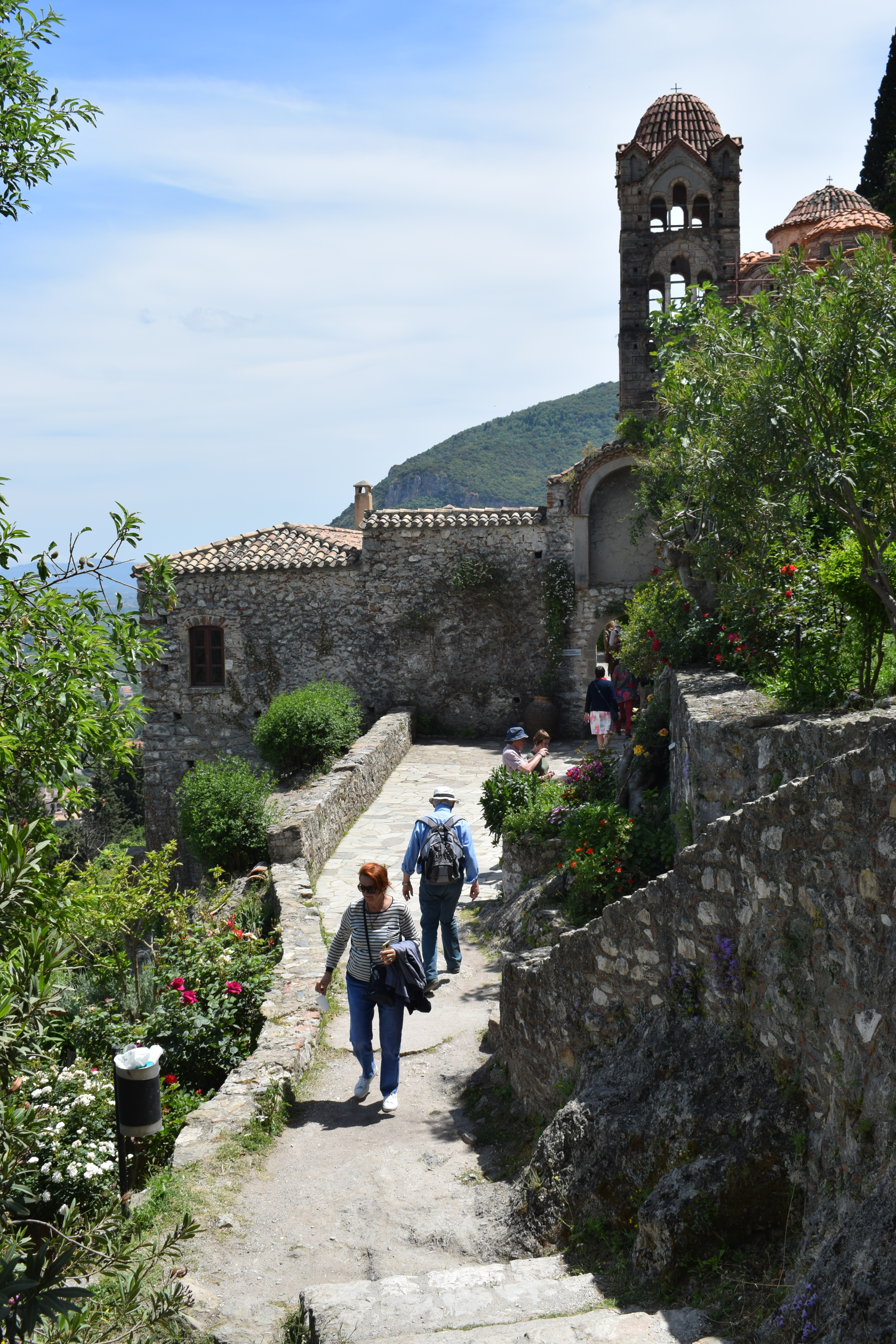 Vue de Mystras en Laconie, dans le sud du Péloponnèse en Grèce.